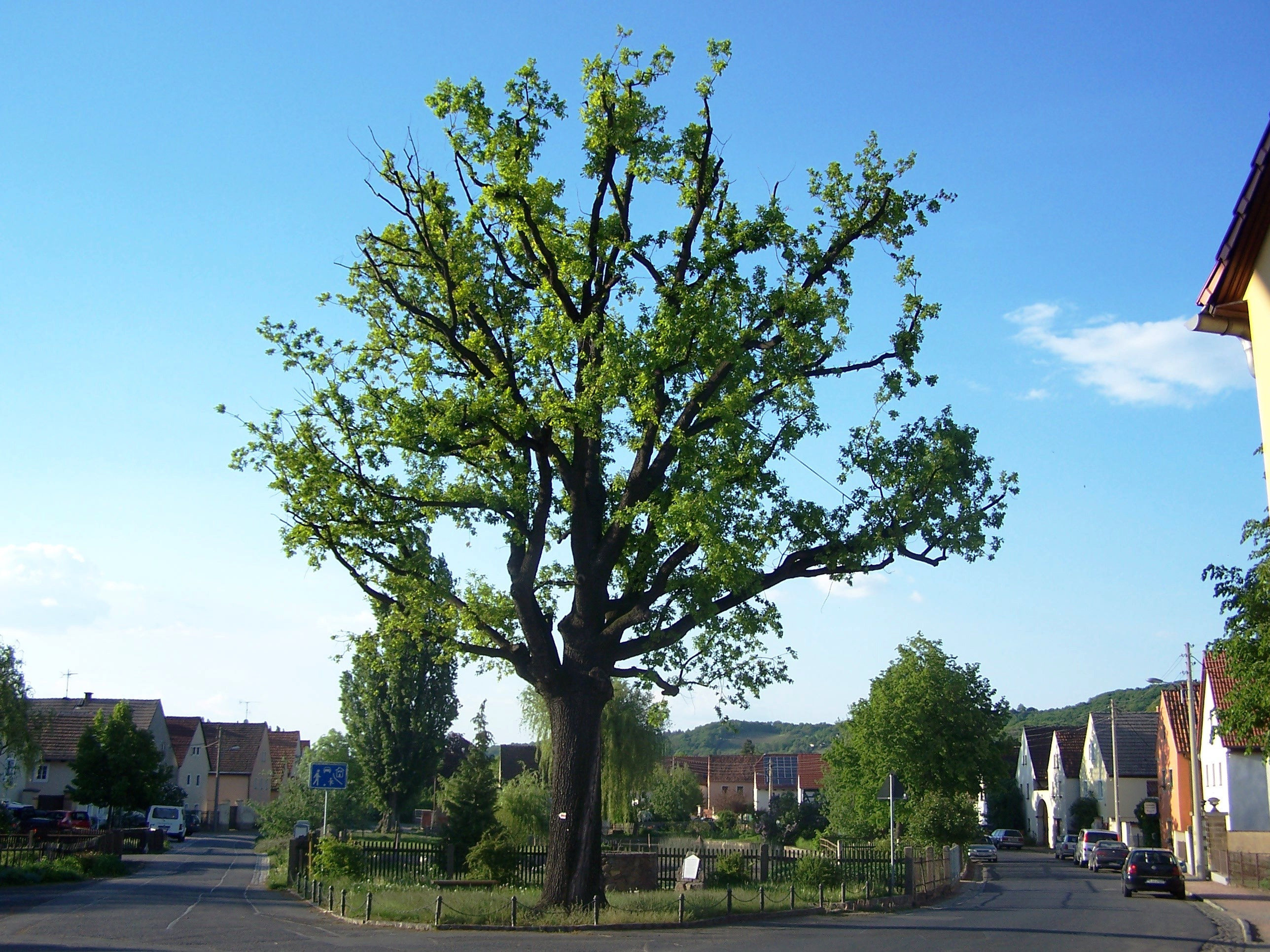 Dorfkern Altnaundorf, heutiger Stadtteil von Radebeul. Im Vordergrund die Bismarckeiche